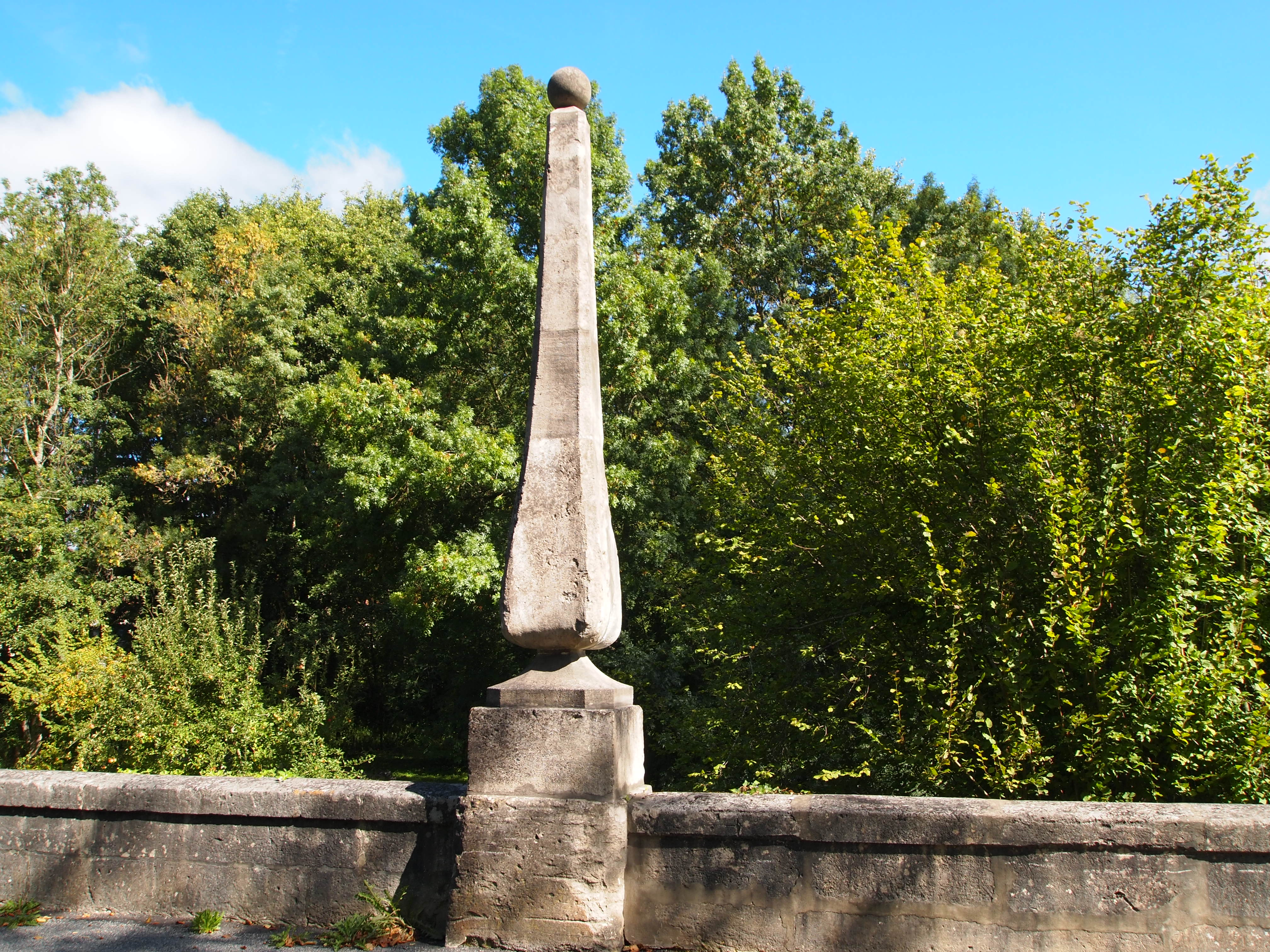 Pyramide sur le pont de l'Antenne à Saint-Sulpice de Cognac en Charente